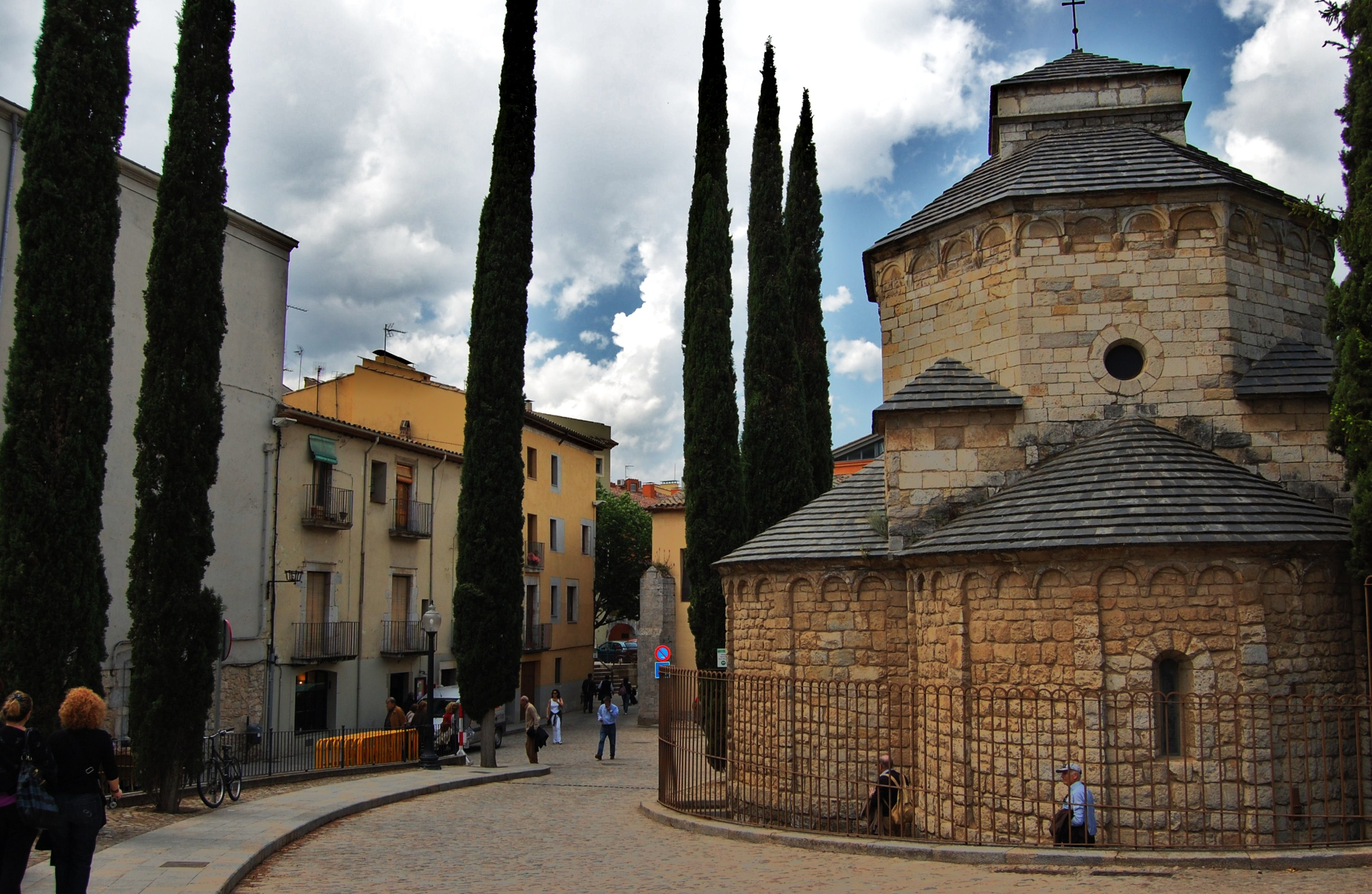 Església de Sant Nicolau (Girona)